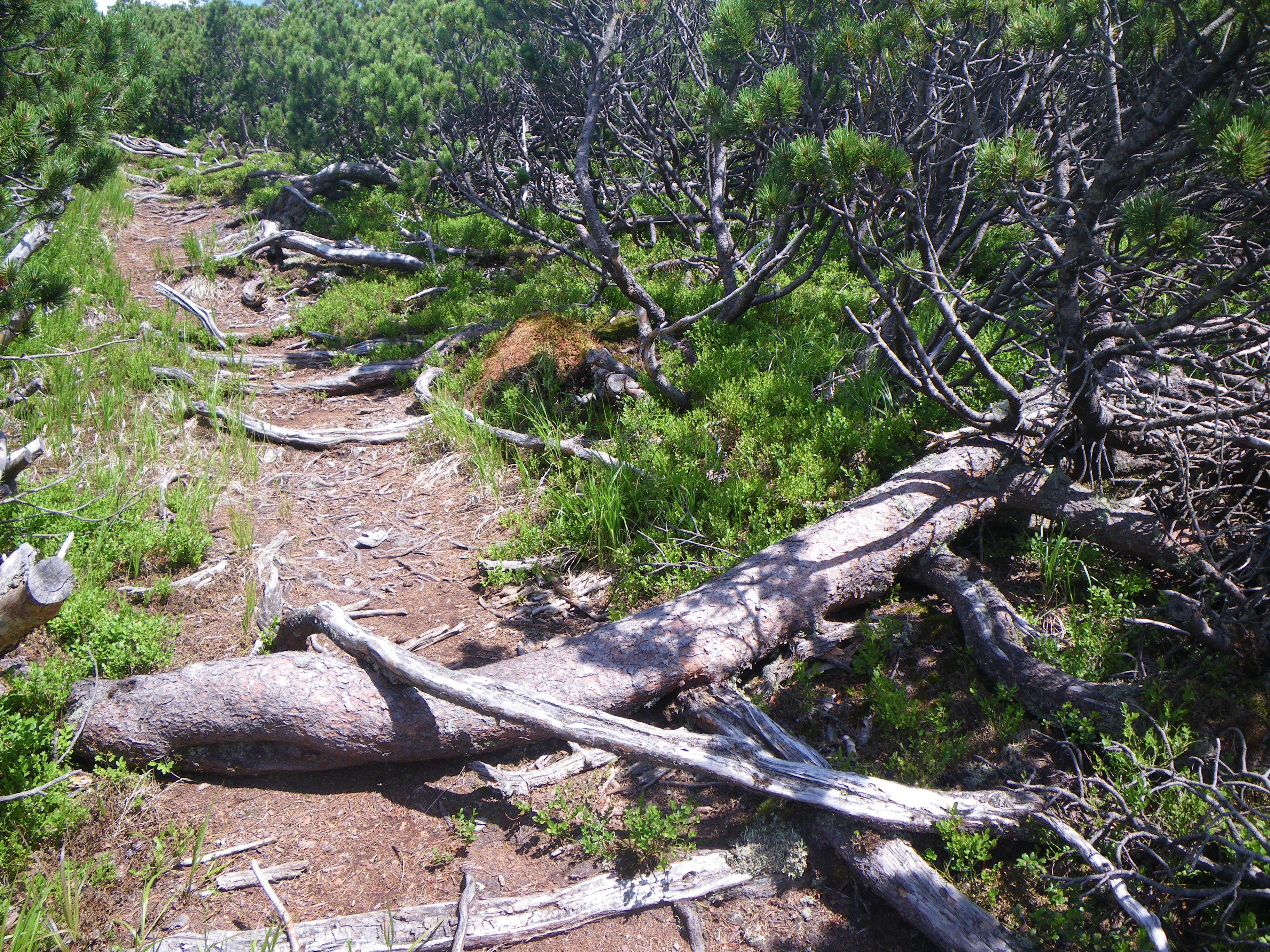 Ймовірно вік рослини 500 років